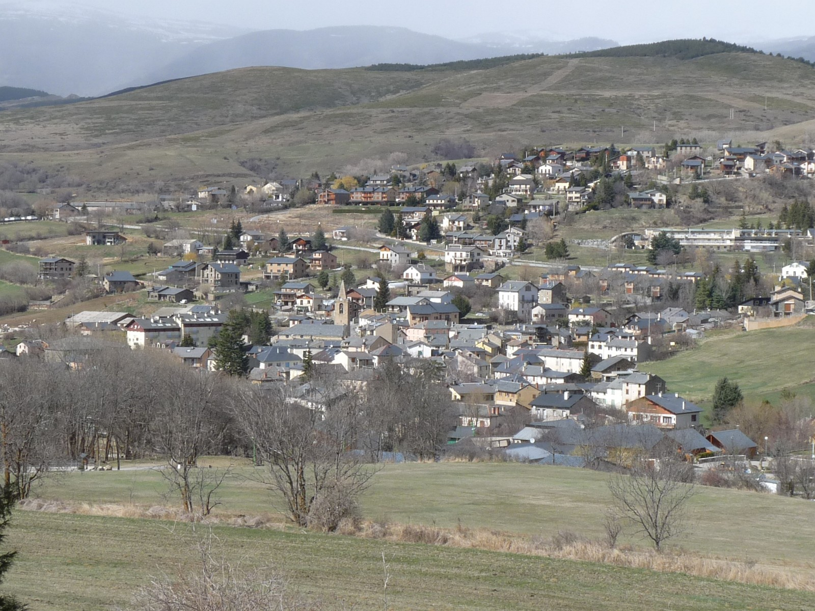 Saillagouse vu de Védrinyans, Saillagouse, Pyrénées-Orientales, France